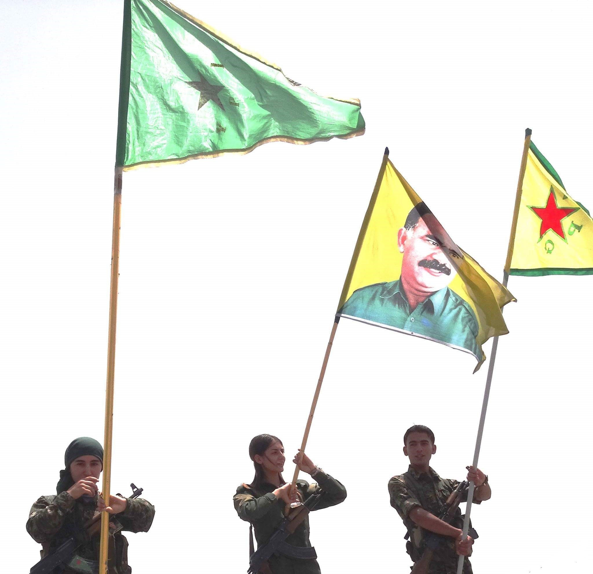 YPG & YPJ YPG